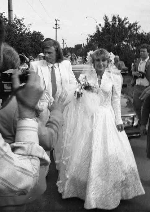 Cununia religioasa a tenismenilor Bjorn Borg si Mariana Simionescu